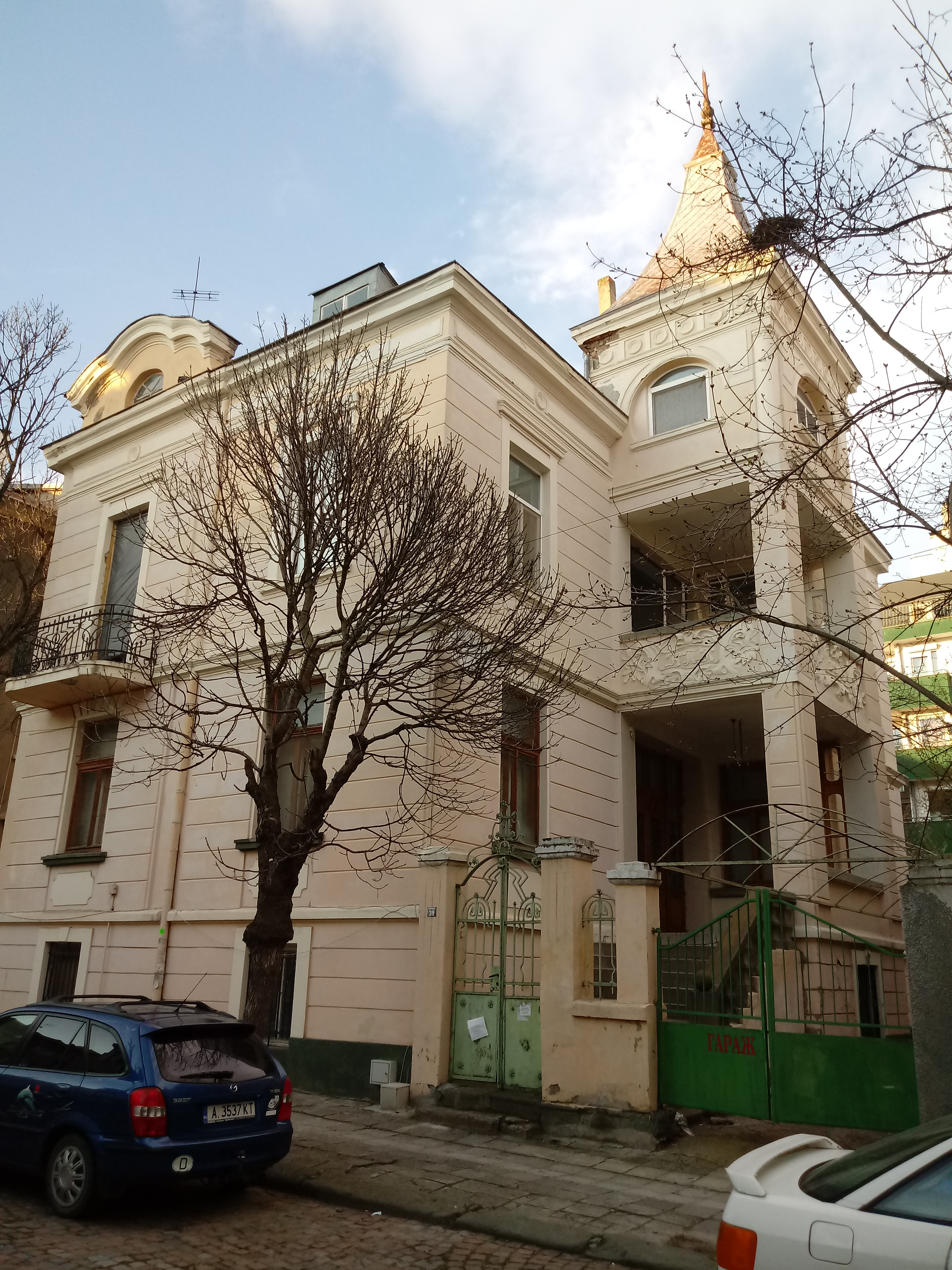 Petko Zadgorski house, Burgas